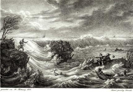 Deichbruch an der Elbe 1825